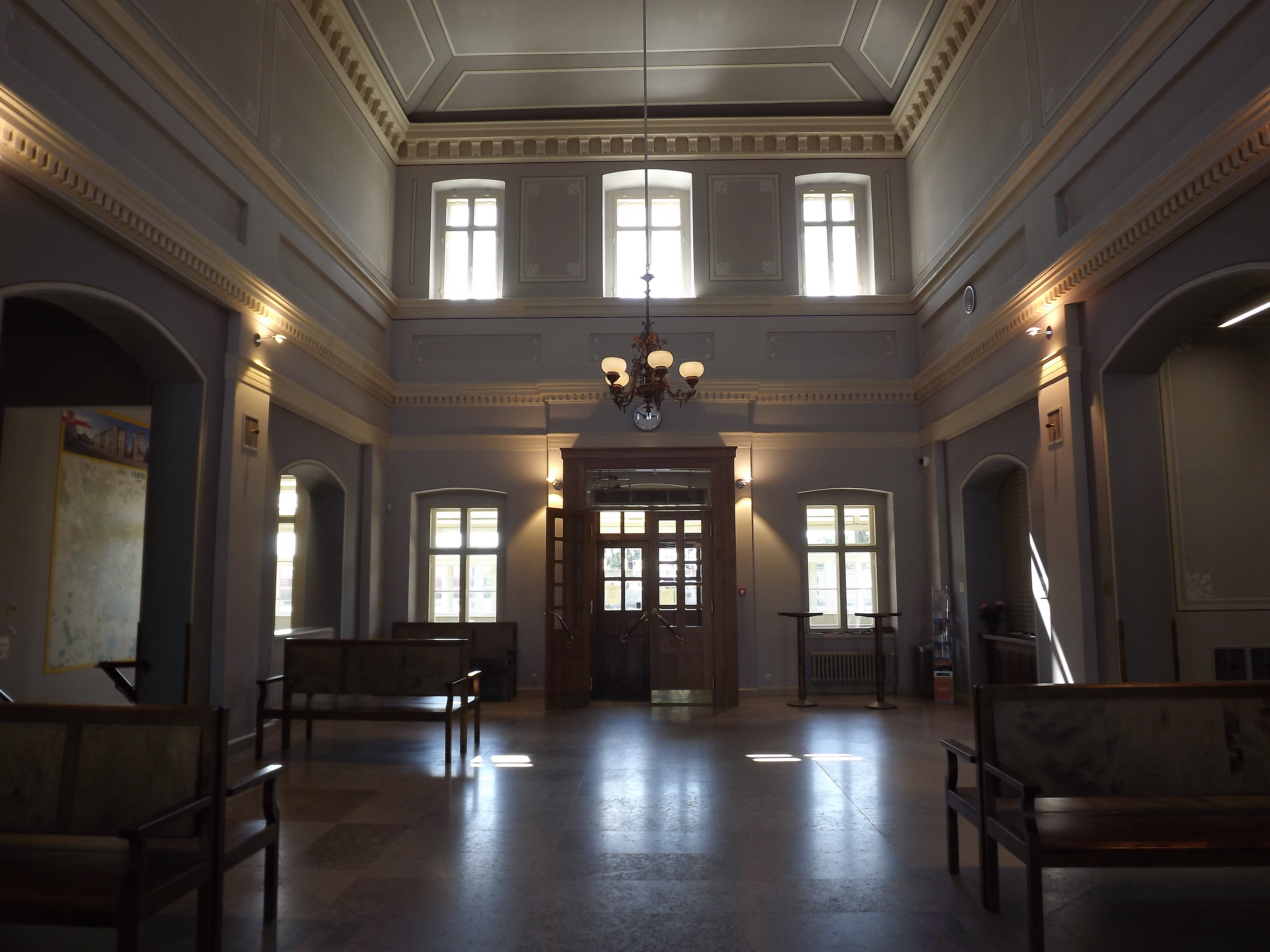 Tartu raudteejaama renoveeritud ootesaal 2013. aastal